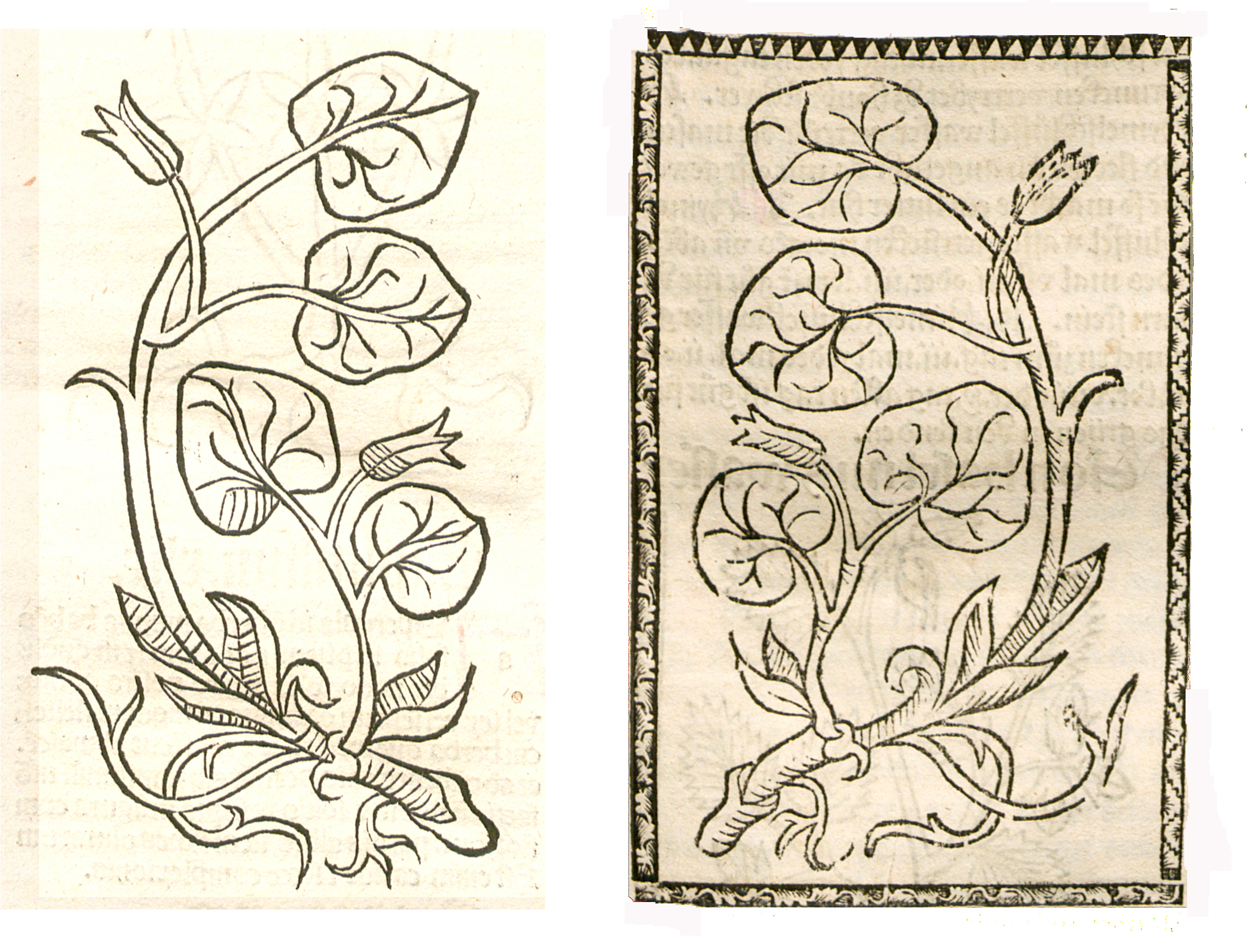 Abbildung von Hasel Wurtz (Asarum europaeum)